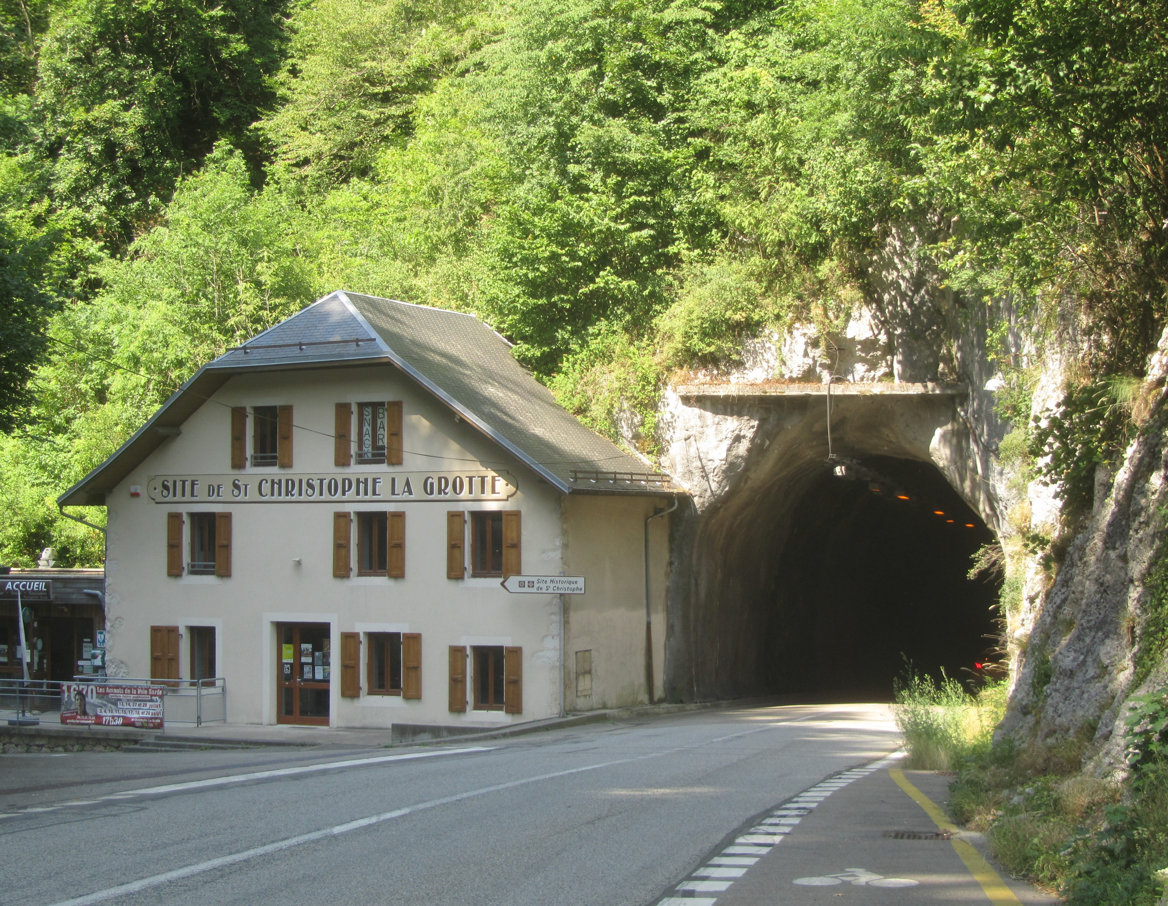 Le tunnel Napoléon, ou Tunnel des Échelles, a remplacé le passage de la Grotte près des Échelles